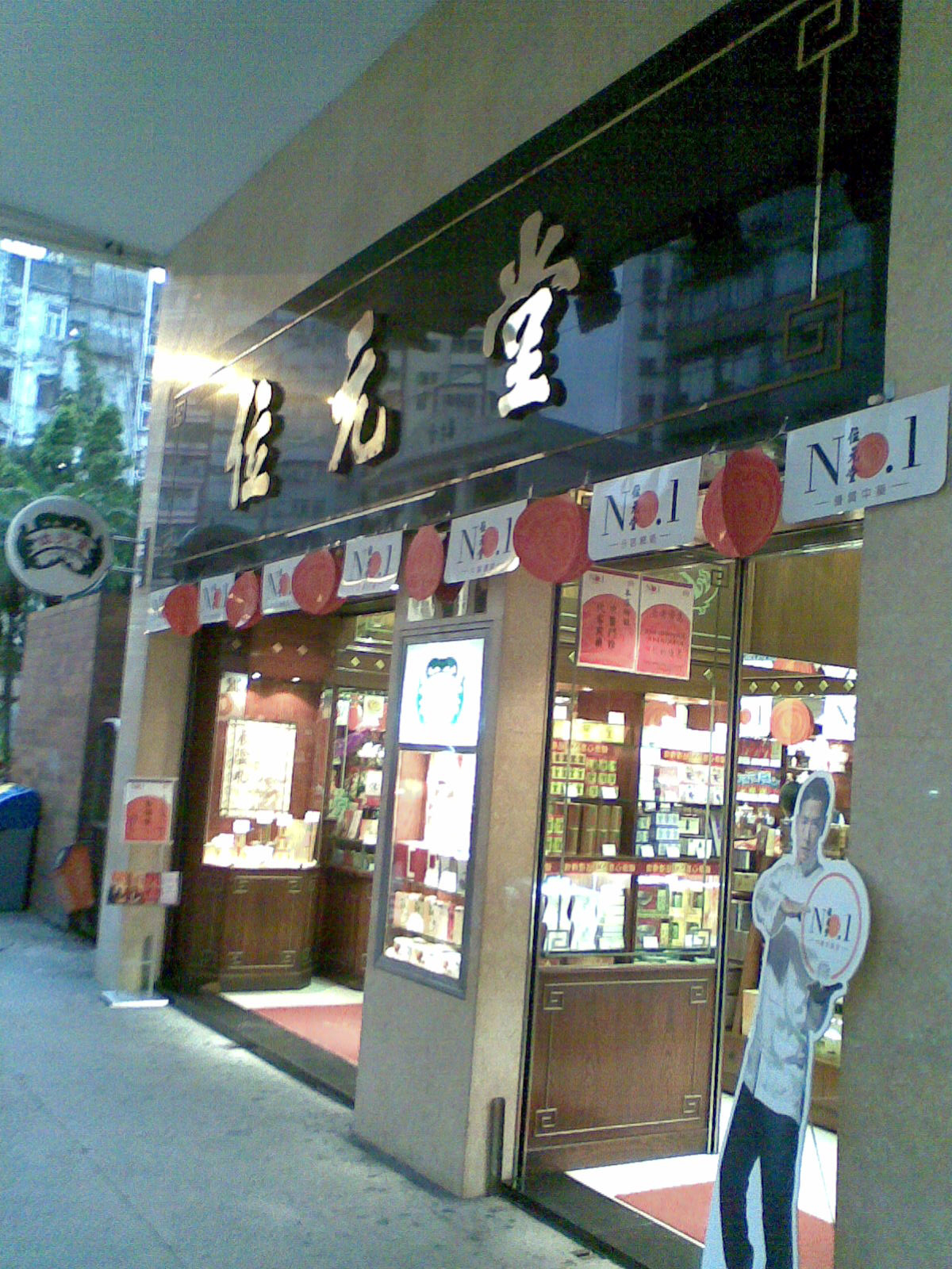 位元堂荔枝角道總店